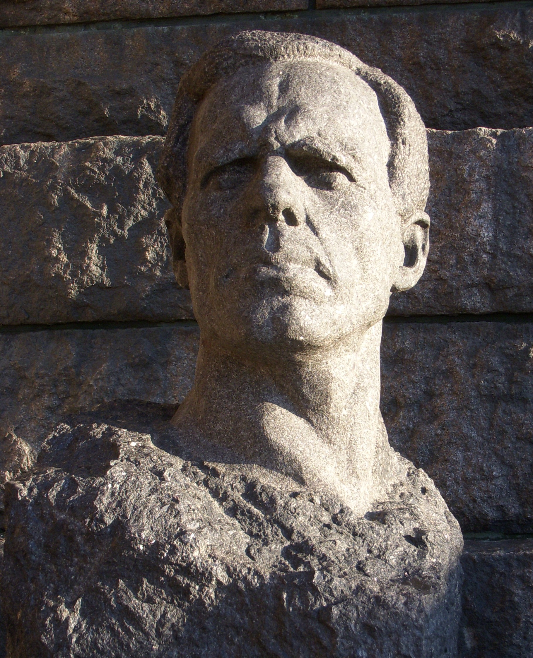 Rafael Rådbergs skulptur visande skulptören Gustaf Sandberg utanför Stockholms Stadshus